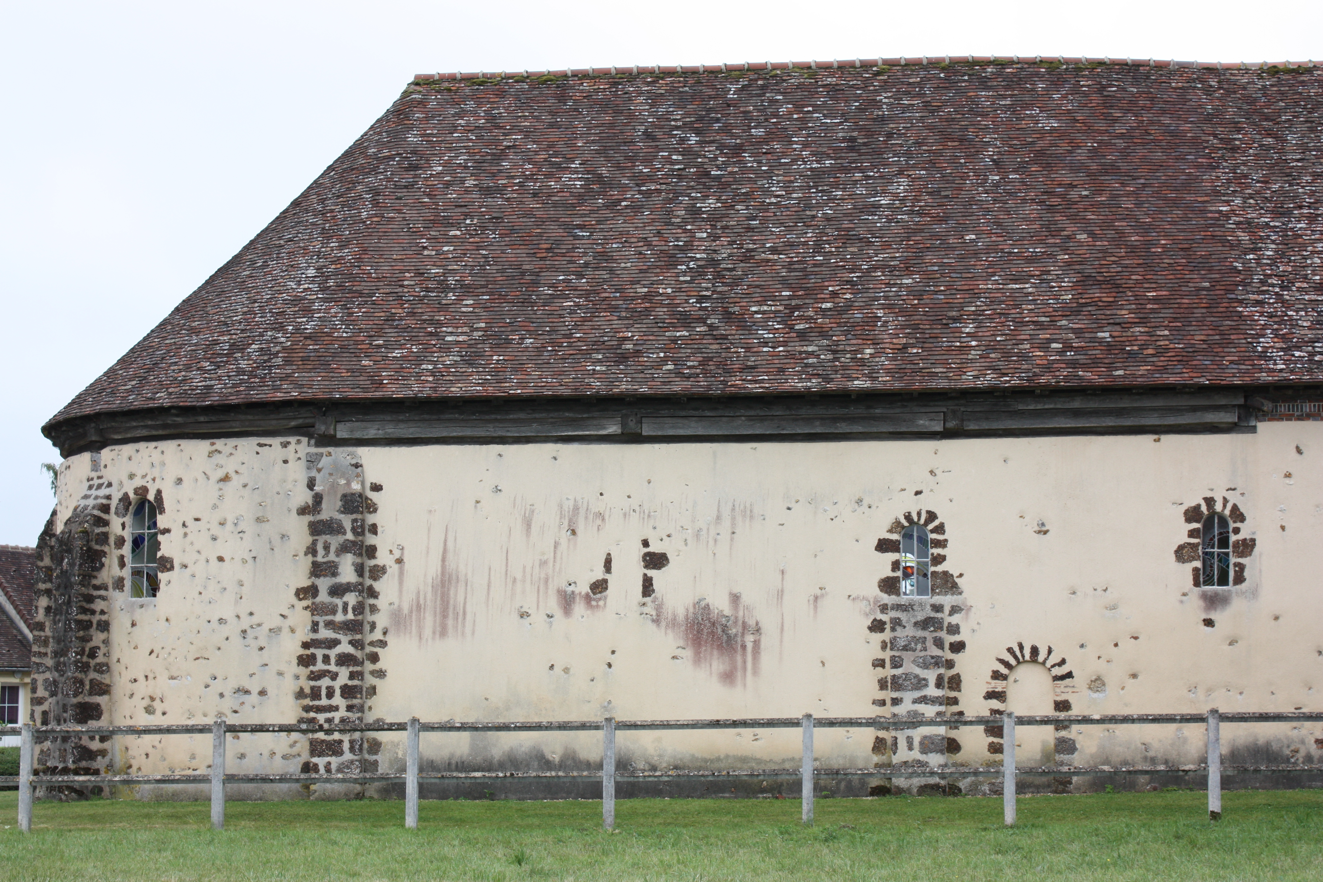 La Framboisière - Eglise Sainte-Madeleine Vue du Nord